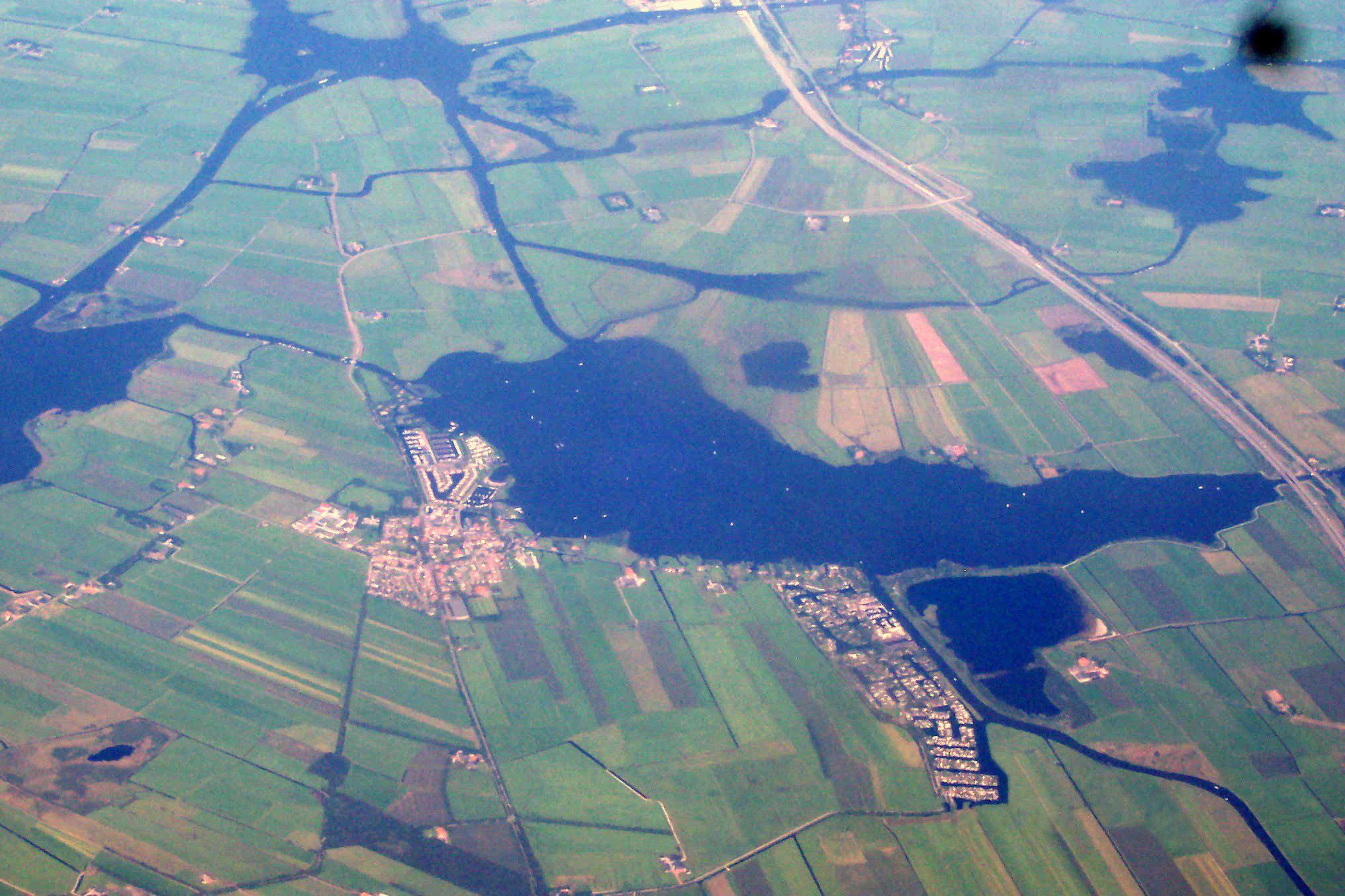 Luchfoto van Langweer